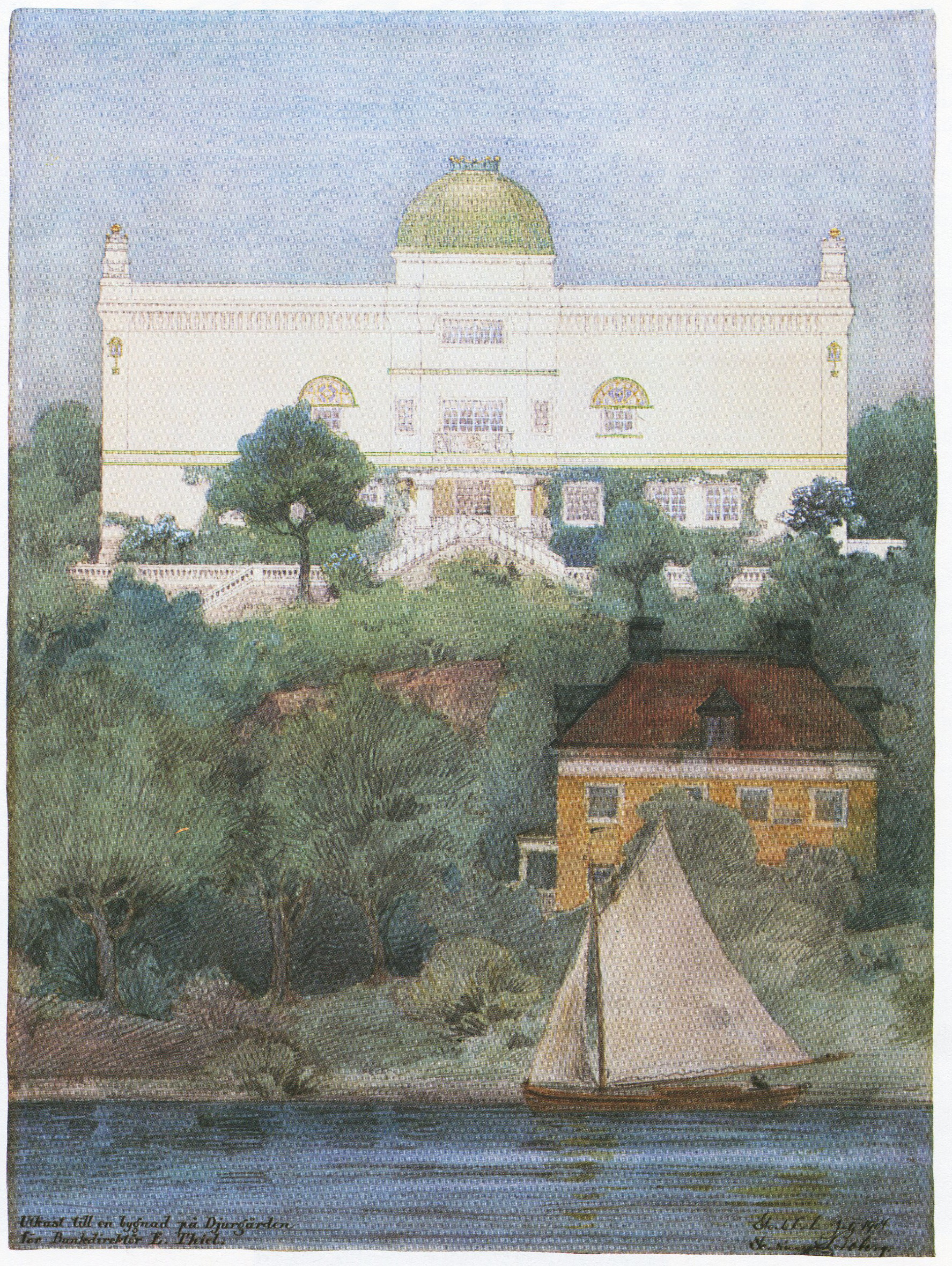 Skiss till "Villa Eolskulle" (Thielska galleriet). Skiss för en byggnad på Djurgården för bankdirektören T. Thiel